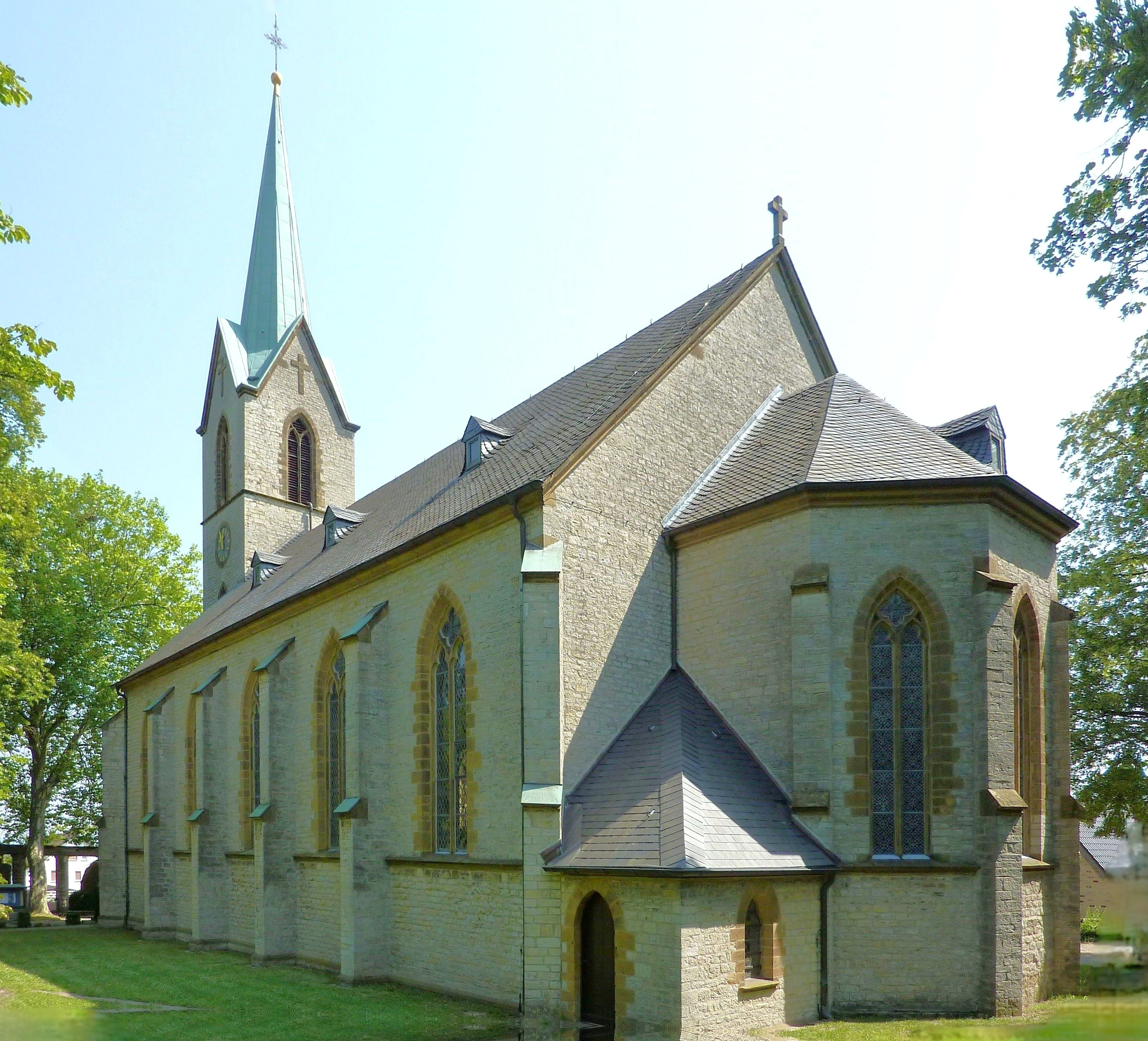 Evangelische Kirche Ubbedissen1